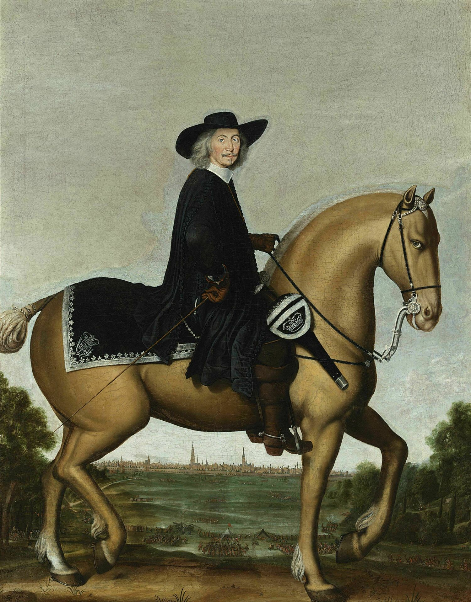 Portret van Bernhard von Galen, bisschop van Munster te paard met op de achtergrond de stad Groningen